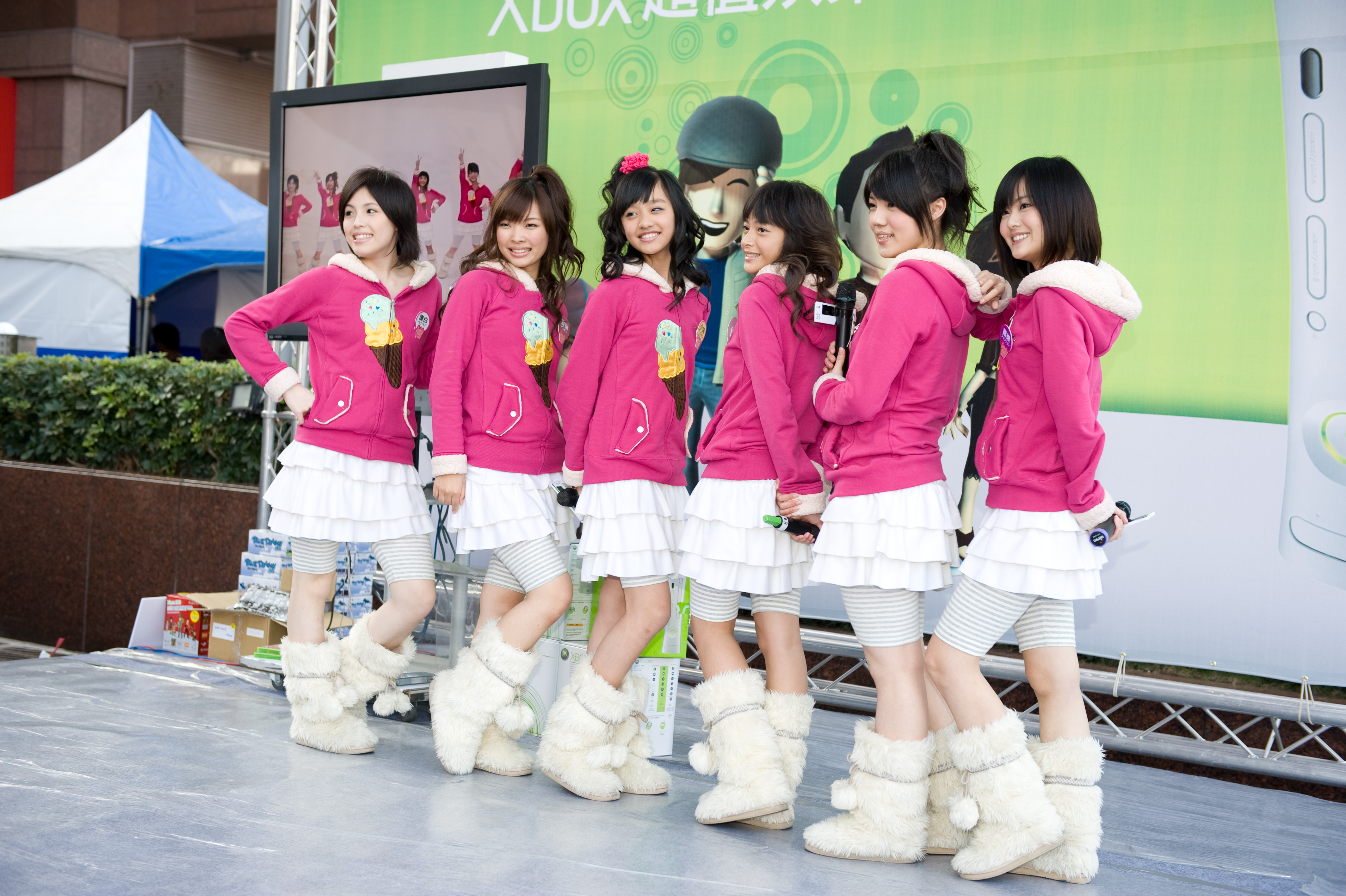 冰淇淋少女組代言xbox 360